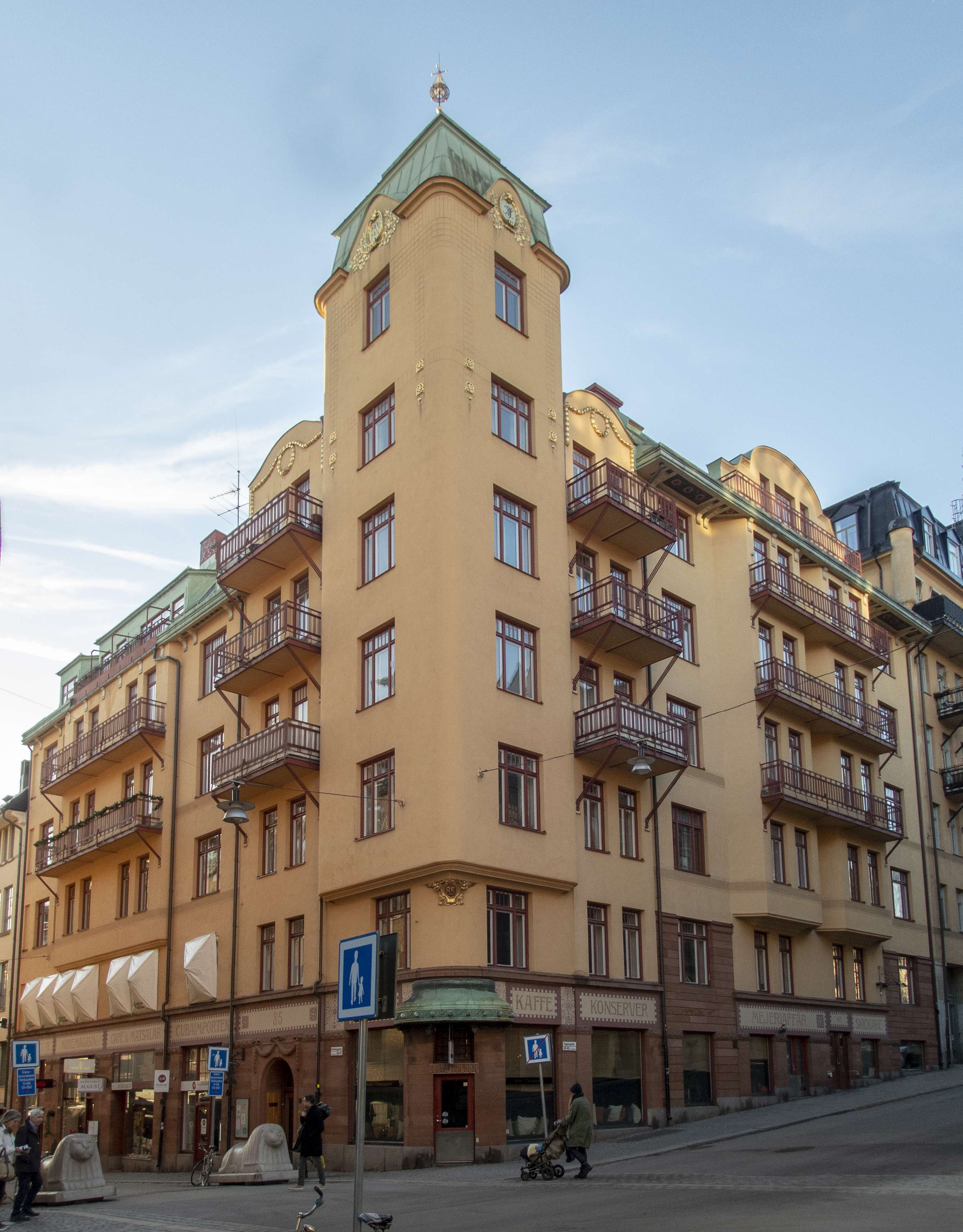 Blå tornet, Strindbergsmuseet, Vingråen 35 Drottninggatan 85, Tegnérgatan 43 Stockholm, Nybyggnadsår 1906 - 1907 C. G. Grip (Byggherre) Hagström & Ekman (Arkitektkontor) L. J. Nordenström (Byggmästare) L. J. Nordenström (Byggherre) P. Jansson (Byggherre)